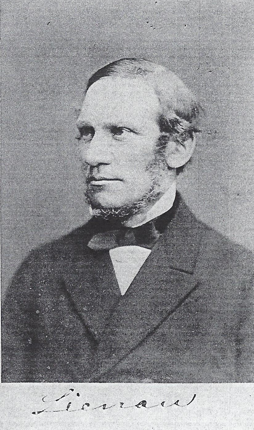 Signierte Porträtfotografie con Cay Dietrich Lienau (1821-1878)